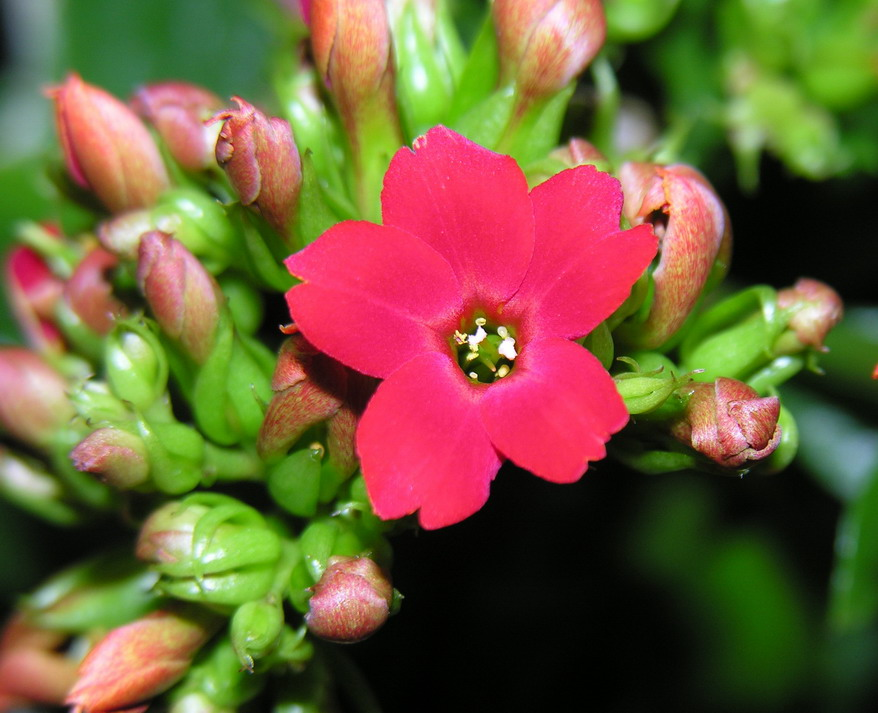 Raudonžiedė kalankė (Kalanchoe blossfeldiana). Šeima. Storlapiniai (Crassulaceae)